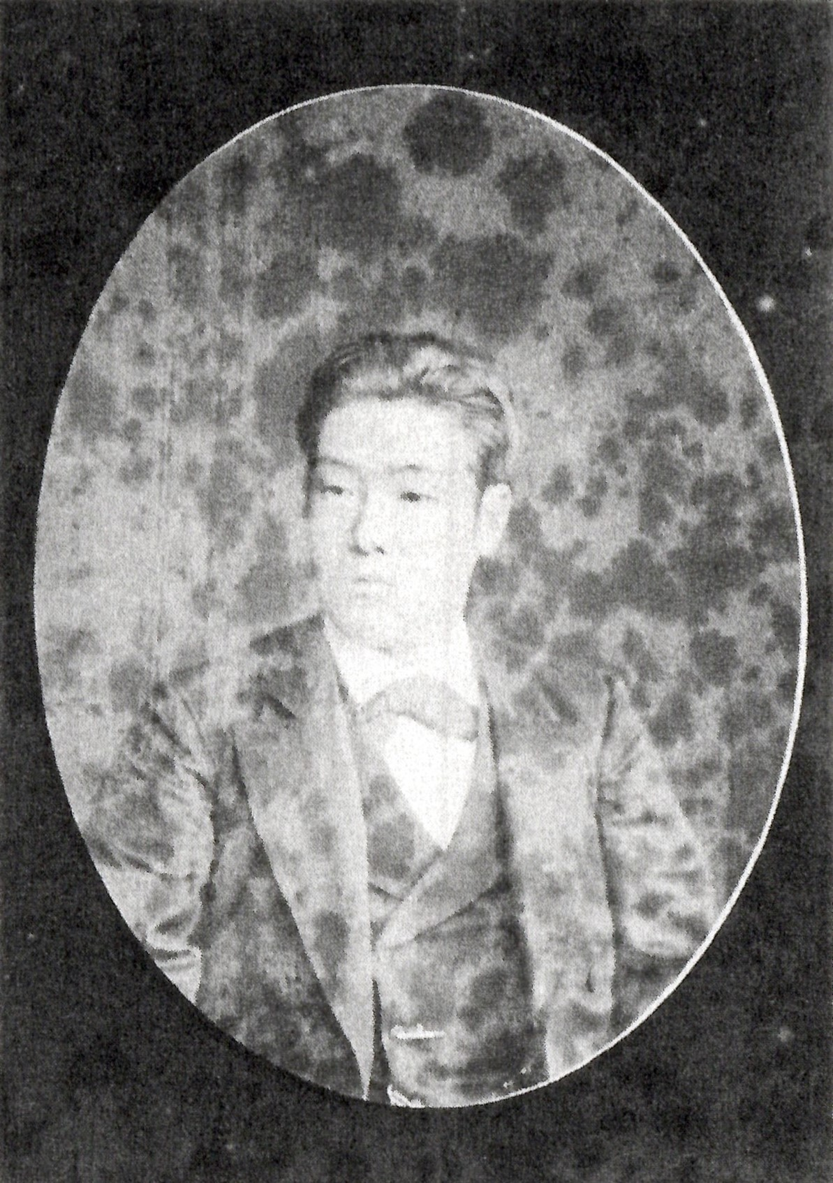 松平直方の肖像写真。